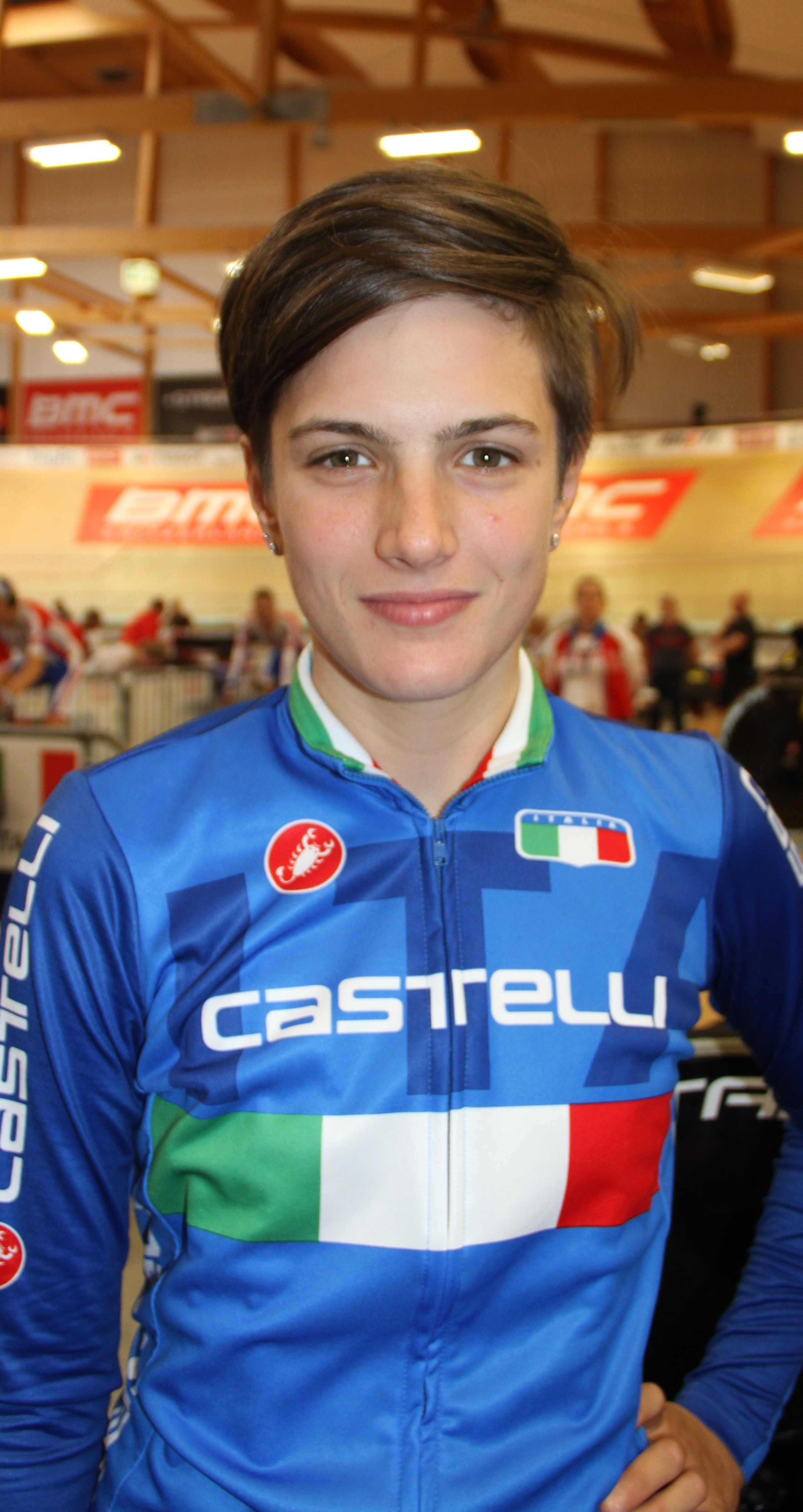 Maria Giulia Confalonieri, italienische Radsportlerin The making of this document was supported by the Community-Budget of Wikimedia Germany.